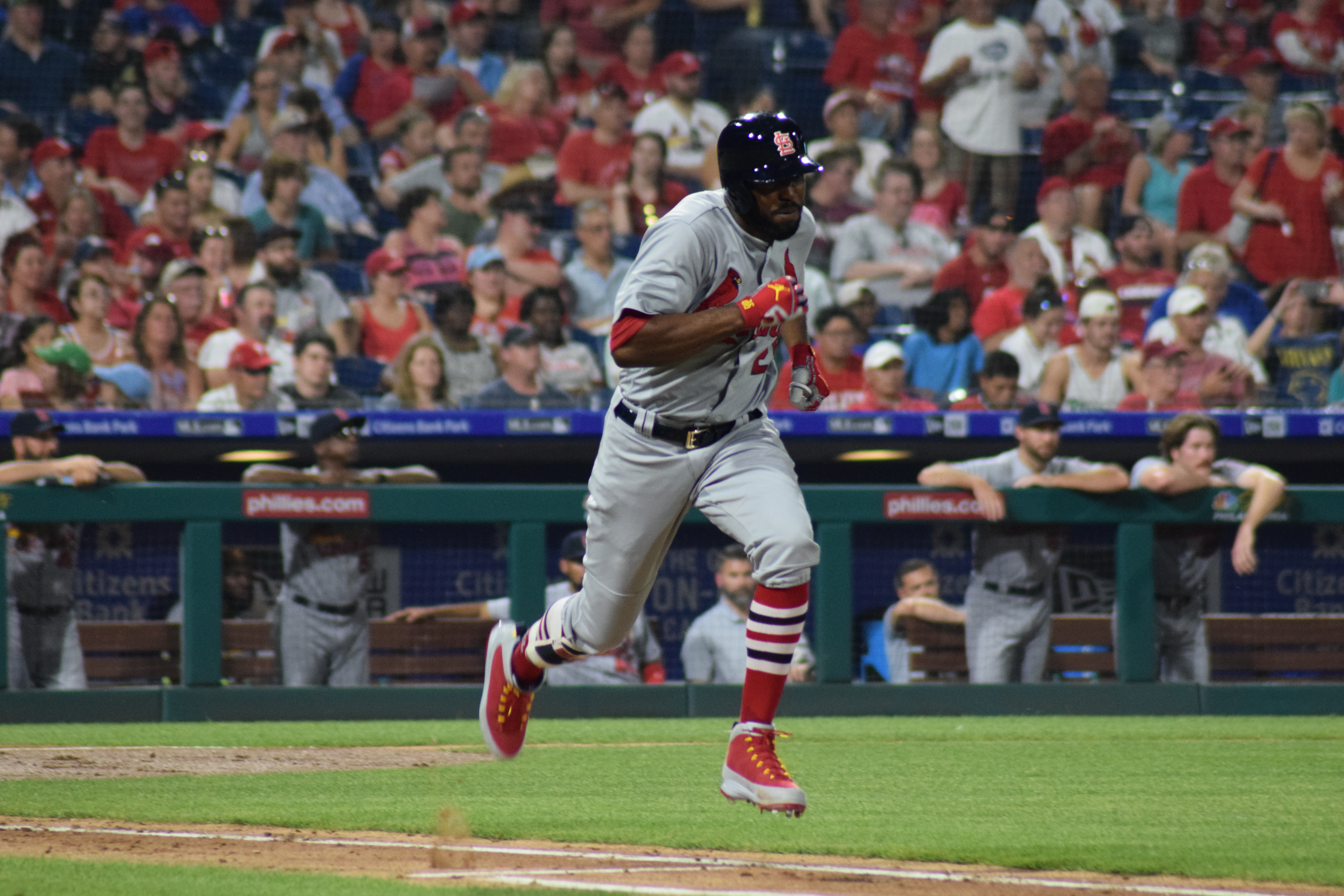 Dexter Fowler